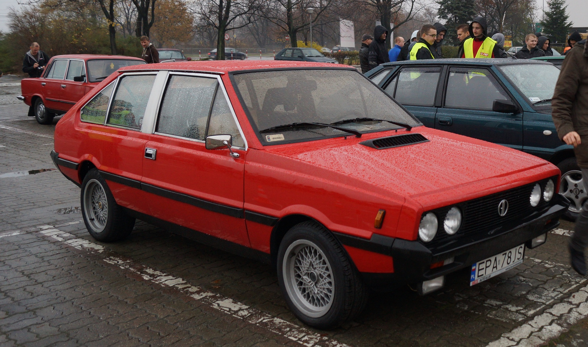 FSO Polonez Coupe 1983 r